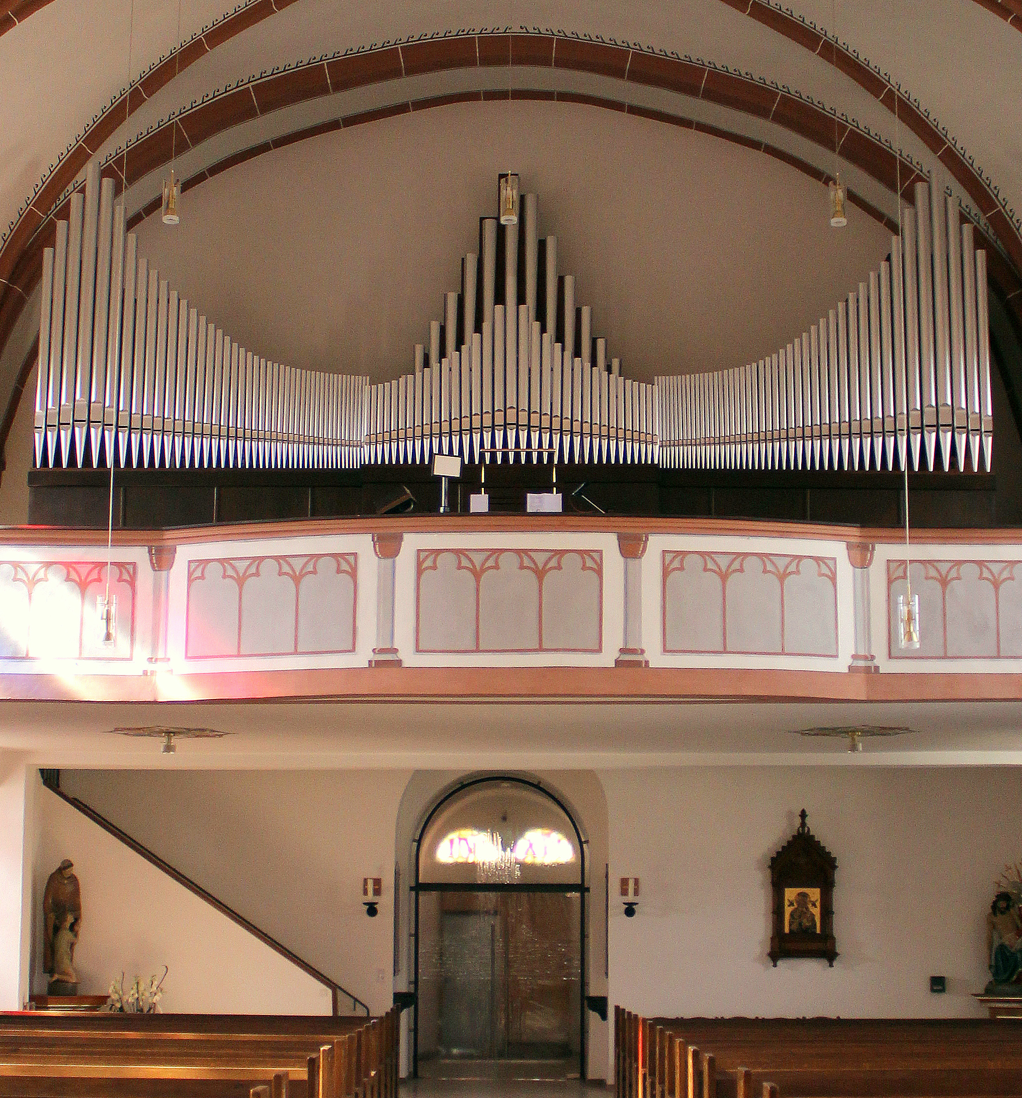 Blick ins Innere der katholischen Pfarr- und Wallfahrtskirche St. Josef in Riegelsberg, Regionalverband Saarbrücken, Saarland